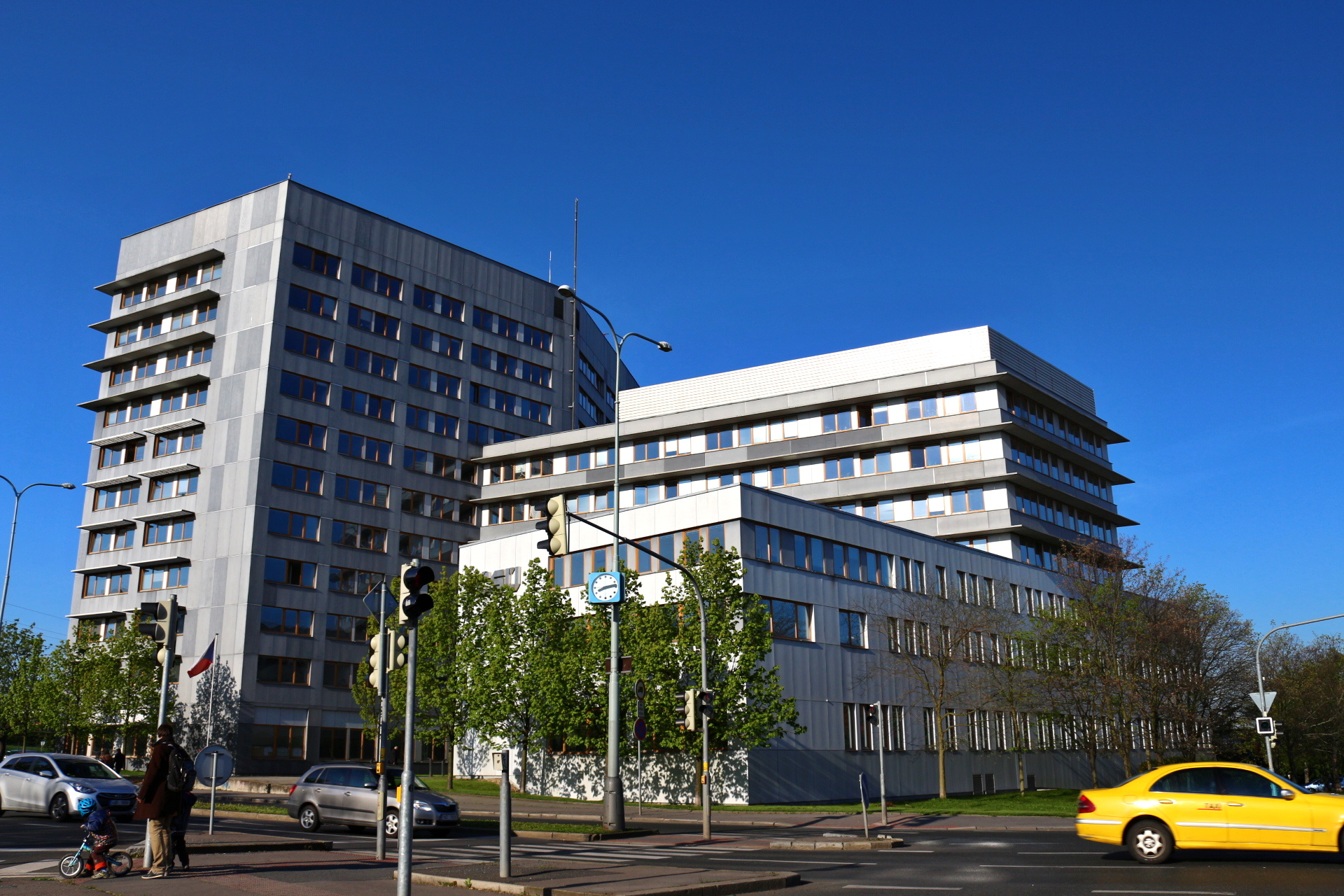 Praha 10, budova ČSÚ na Skalce